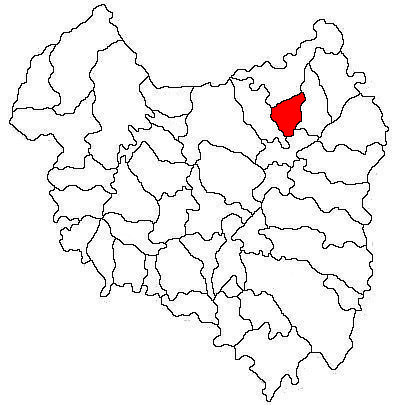 Categorie:Hărţi ale judeţului Covasna